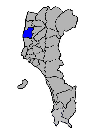 本圖係小籃子為編輯臺灣省屏東縣屏東市所改繪，感謝KJ提供原圖。